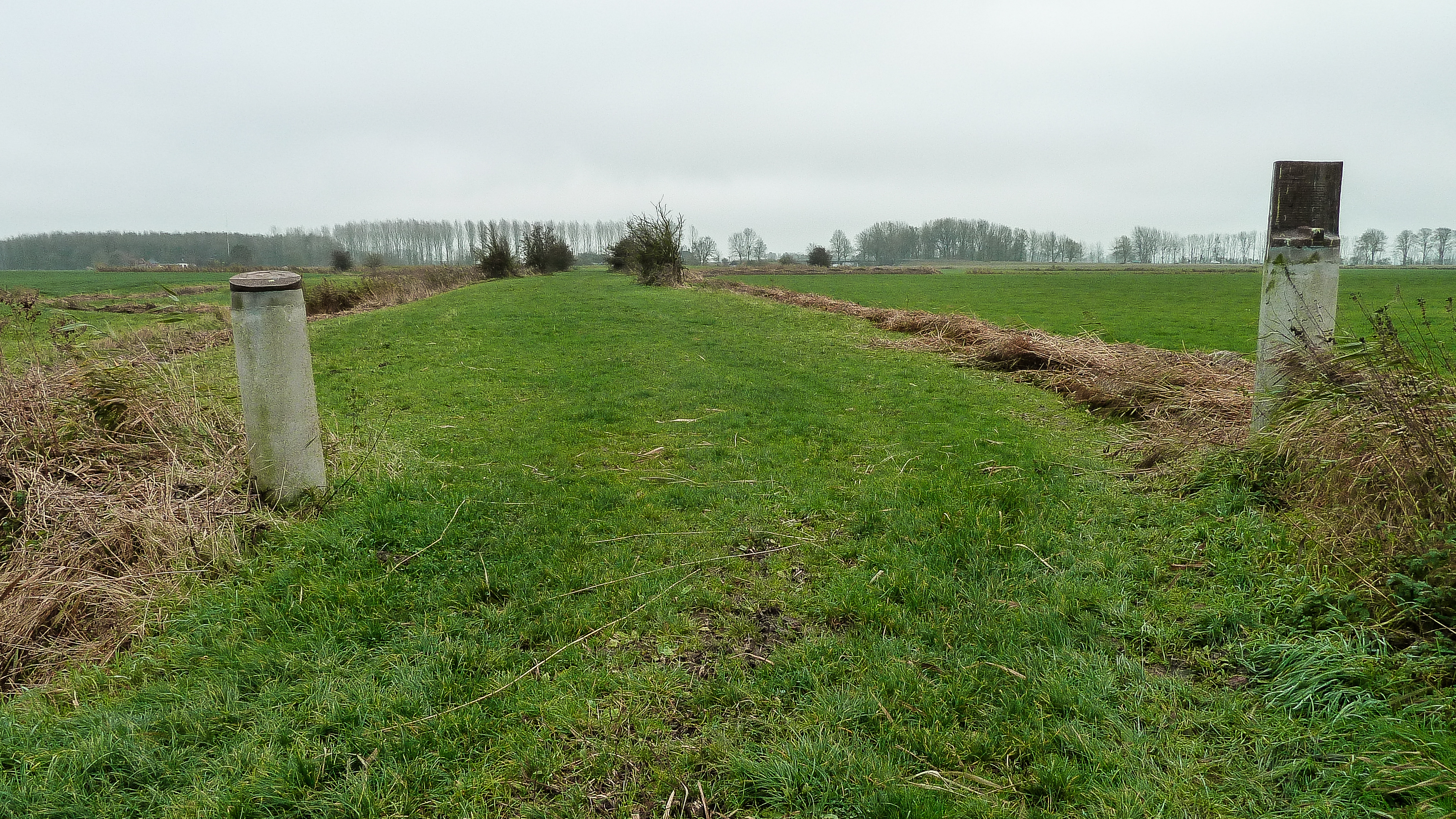 Entree borgterreinen Tammingahuizen